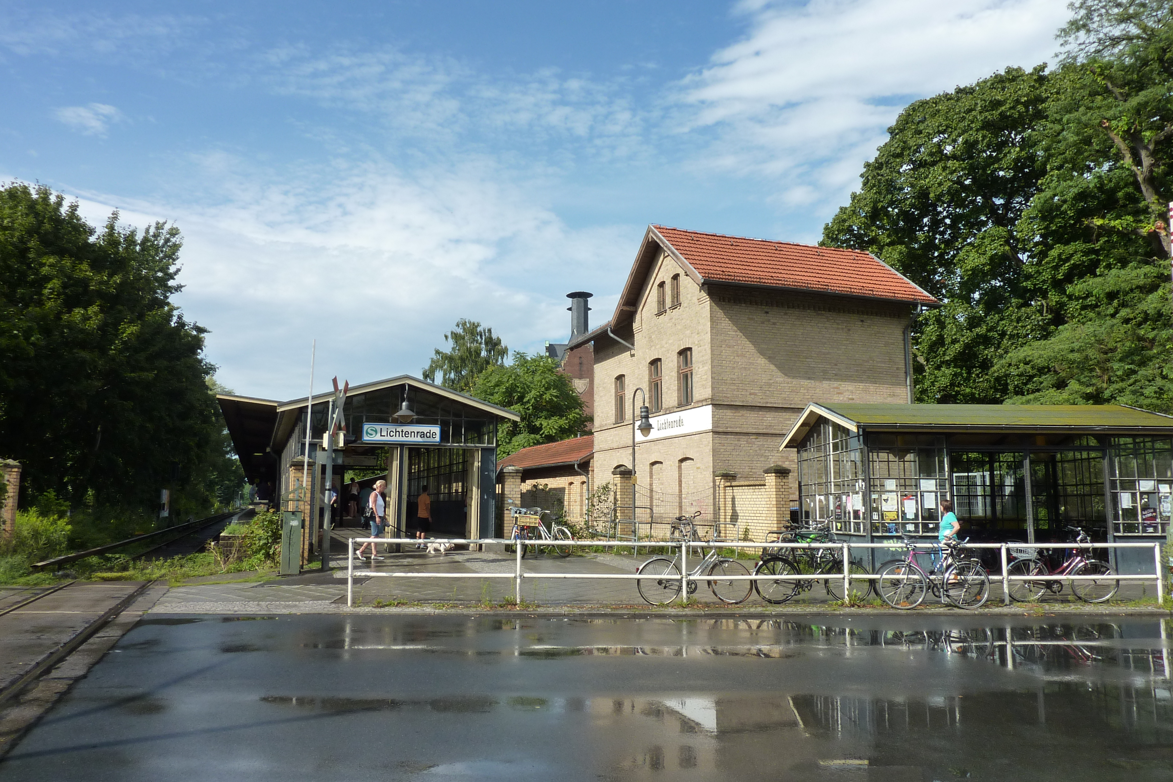 Der Berliner S-Bahnhof Lichtenrade an der Bahnhofstraße.